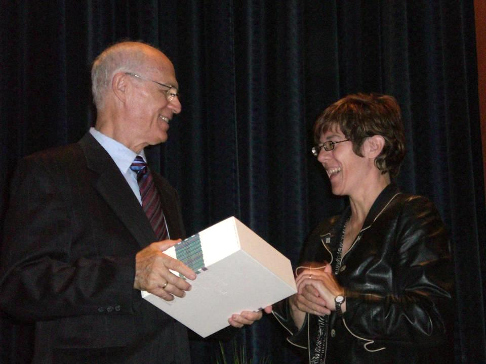 Tzvi Avni bei einem Empfang durch die saarländische Bildungsministerin Annegret Kramp-Karrenbauer